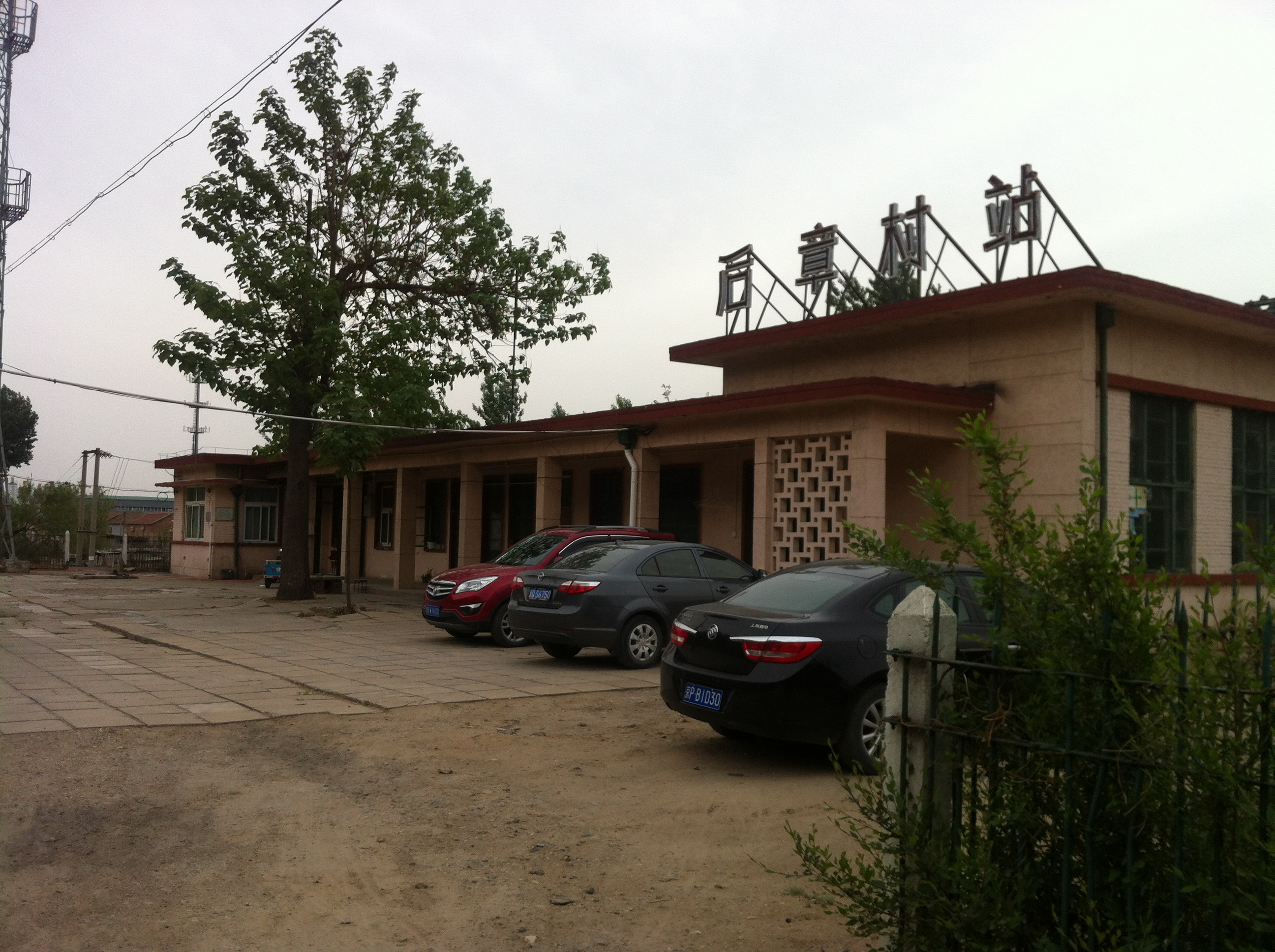 北京西北环线后章村站